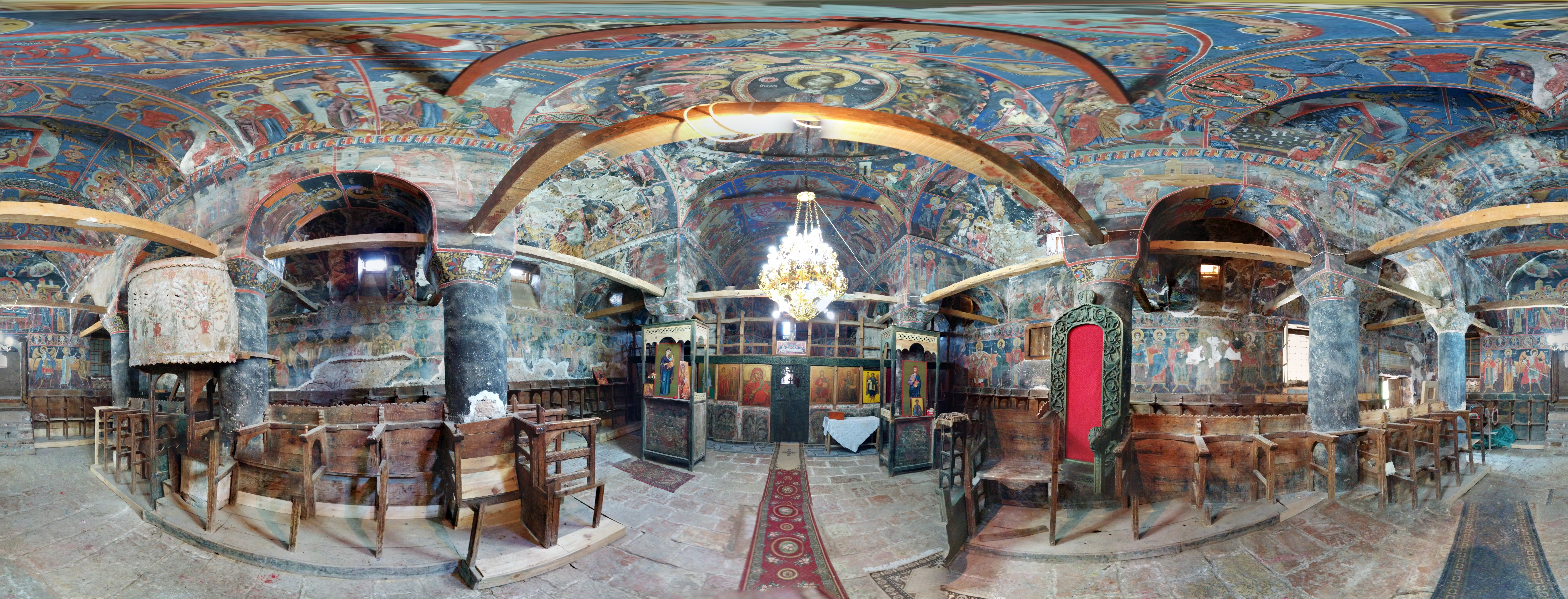 Kisha e Shen Mehillit në Vithkuq